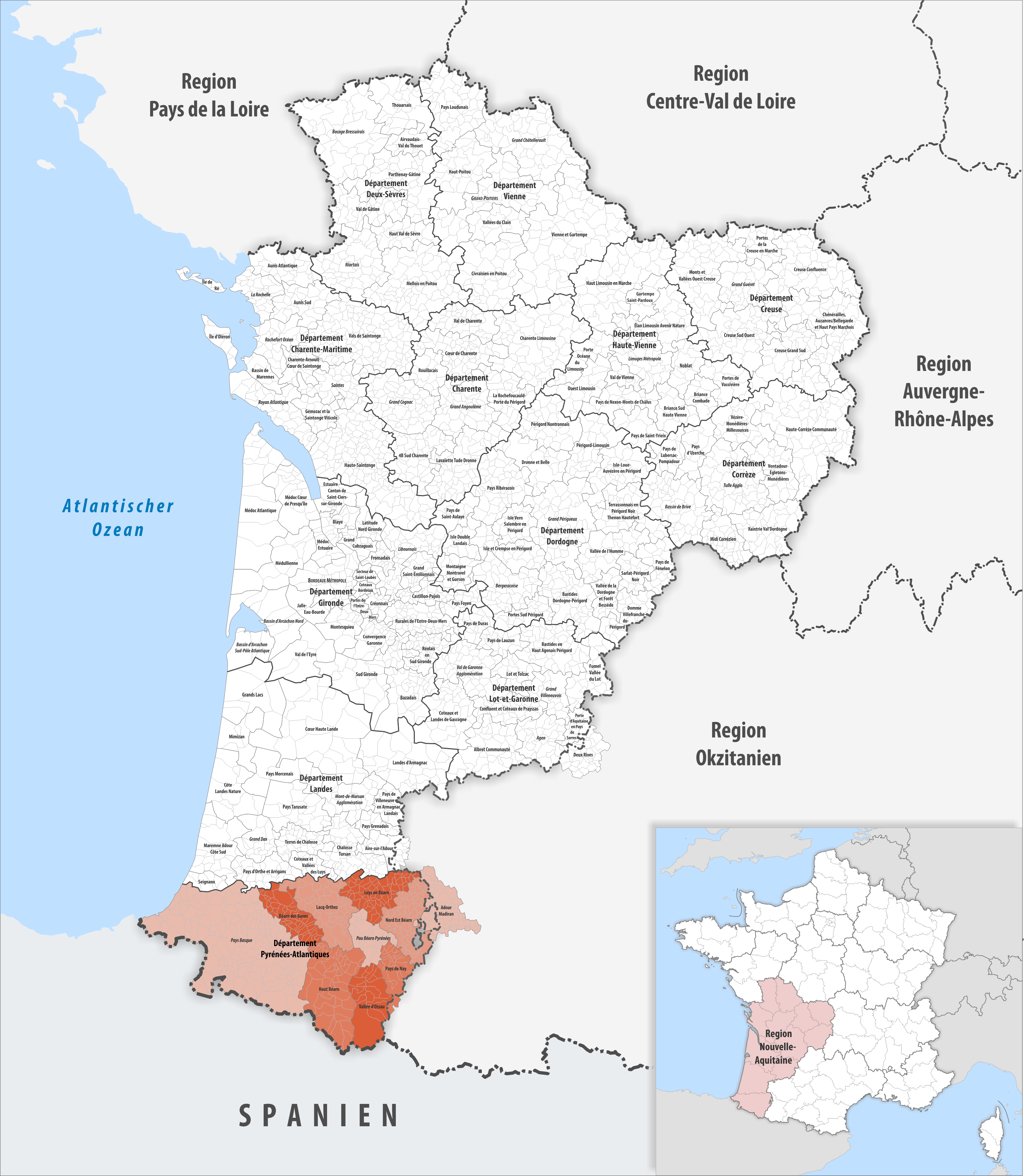 Gemeindeverbände im Département Pyrénées-Atlantiques